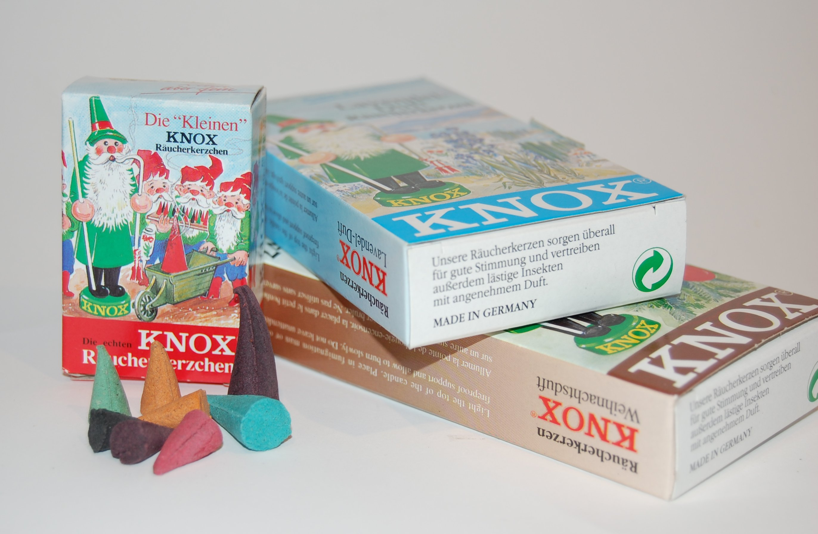 Räucherkerzen der Firma KNOX